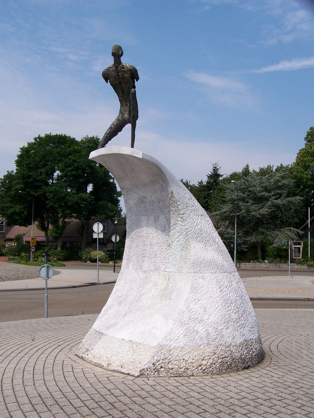 De Golf (2000) in Hoogezand. Gemaakt door Harm van Weerden en Jan Steen.